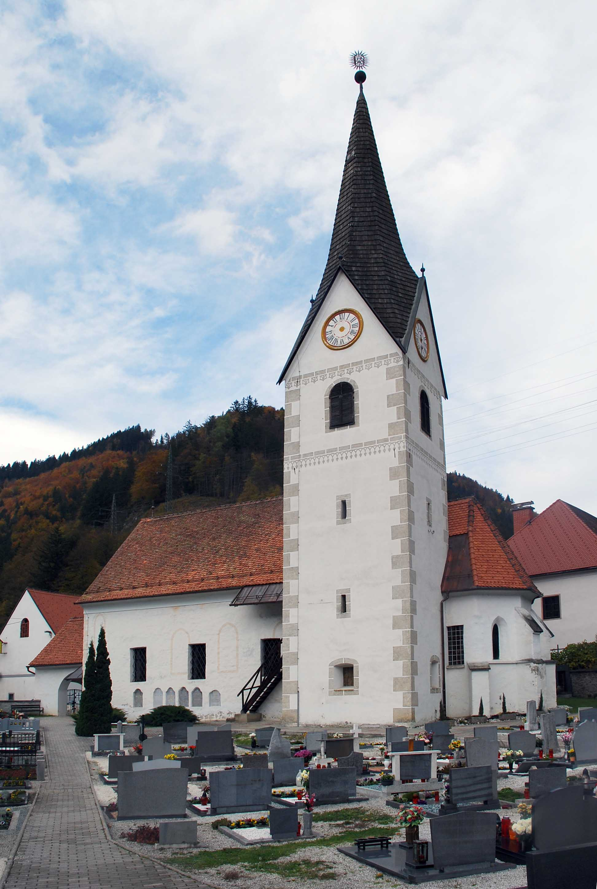 Kirche in Brezno vom Friedhof aus, Slowenien